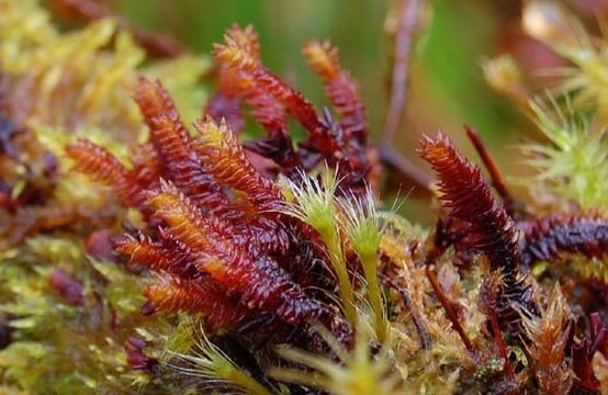 Public domain